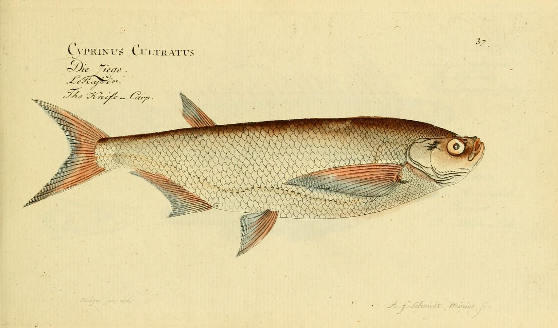 CyPltlNUS CtTLTRATUS